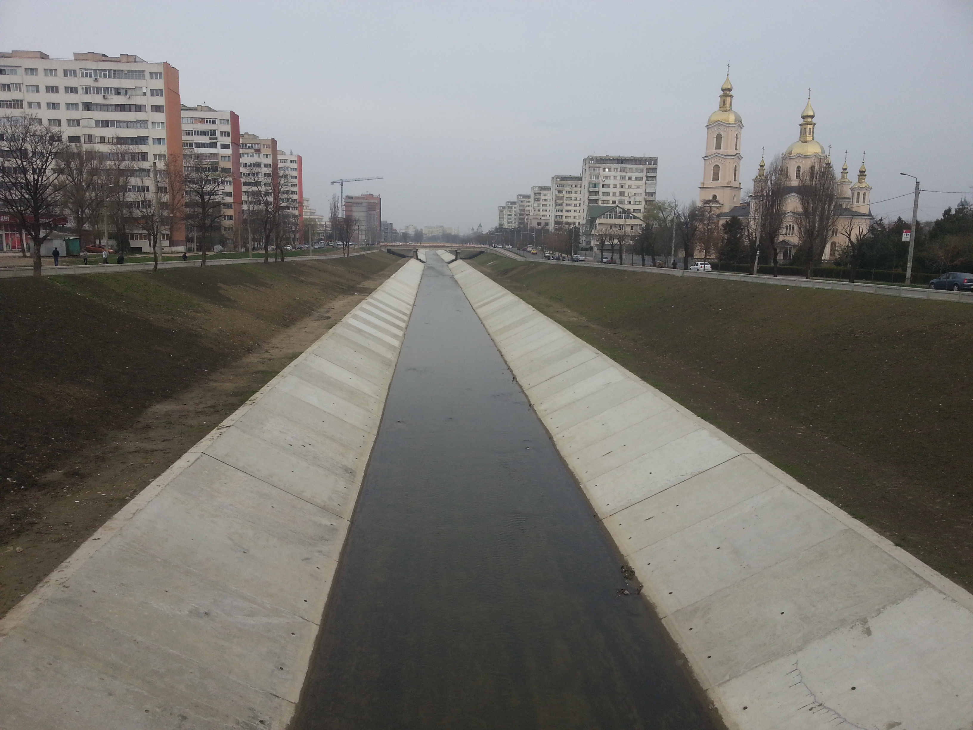 صورة لنهر باهلوي في مدينة ياش، ما بعد الترميم.